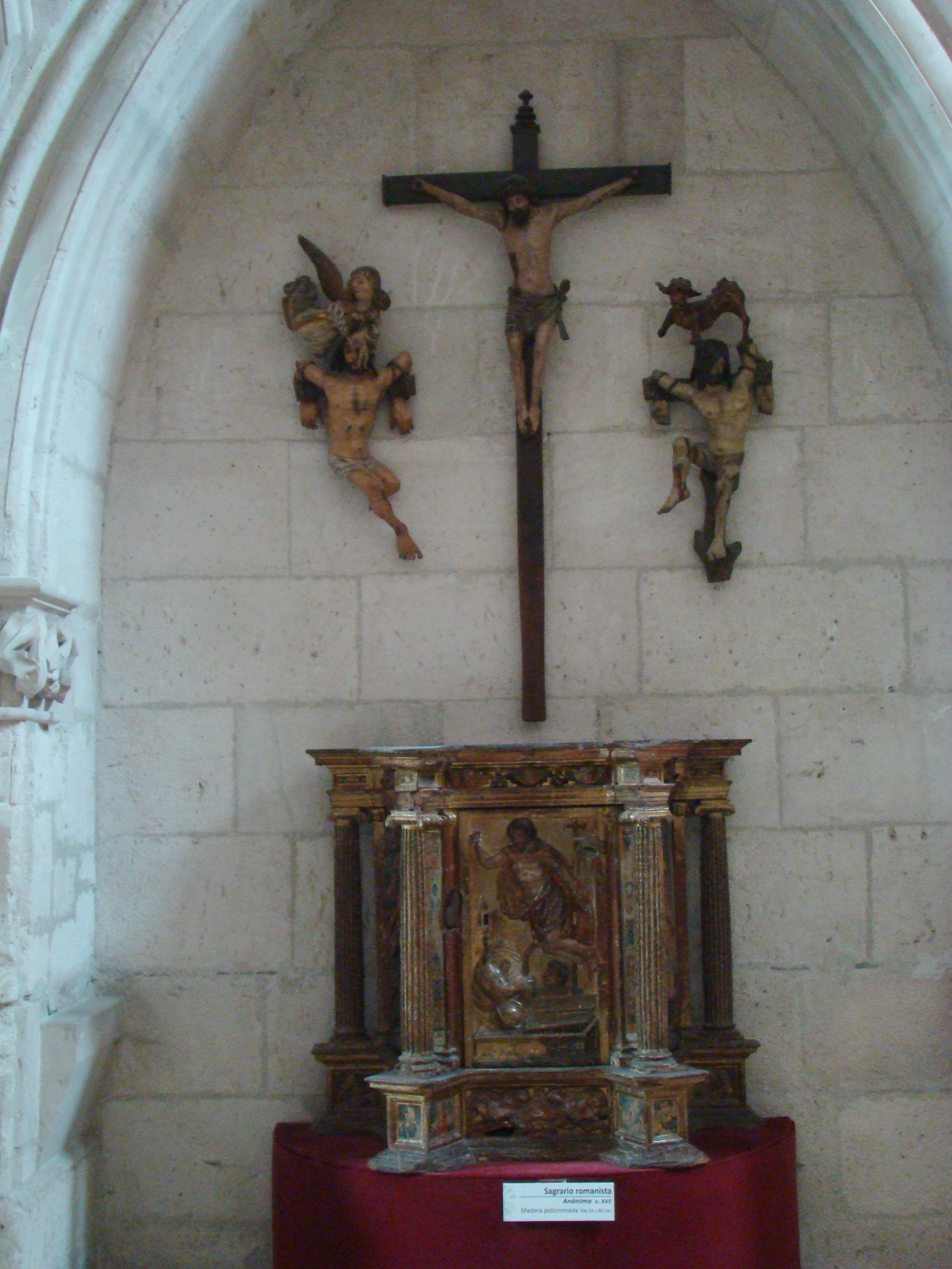 Calvario formado por un crucificado y los dos ladrones, obra anónima del primer tercio del siglo XVI, atribuida al Maestro de San Pablo de la Moraleja. Se encuentra en el Museo Diocesano y Catedralicio de Valladolid, España.